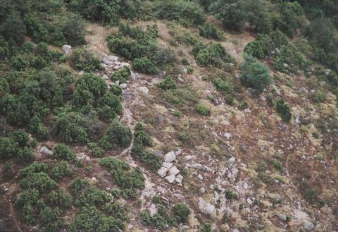 Kékkút, Hungary, aerialphotography